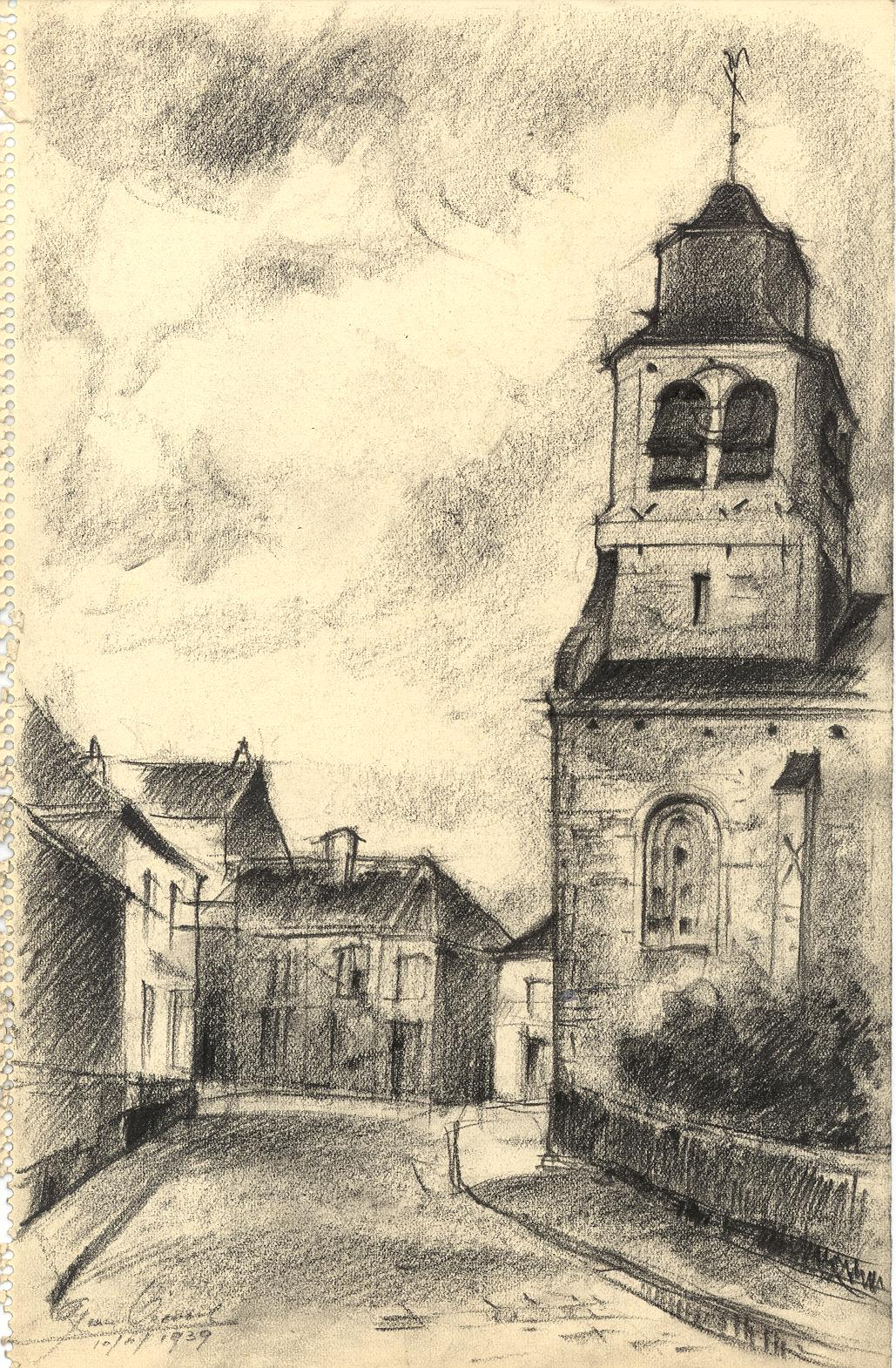 La nouvelle église Saint-Nicolas et le village de Neder-over-Heembeek, dessin du 10 novembre 1939, par Léon van Dievoet, architecte à Bruxelles.